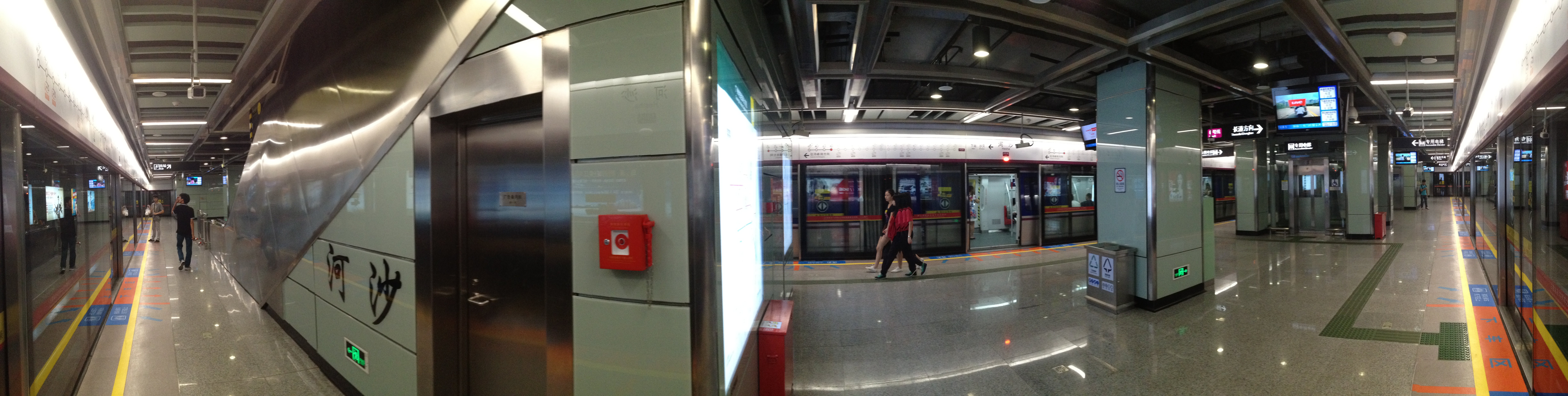 广州地铁河沙站月台全景图